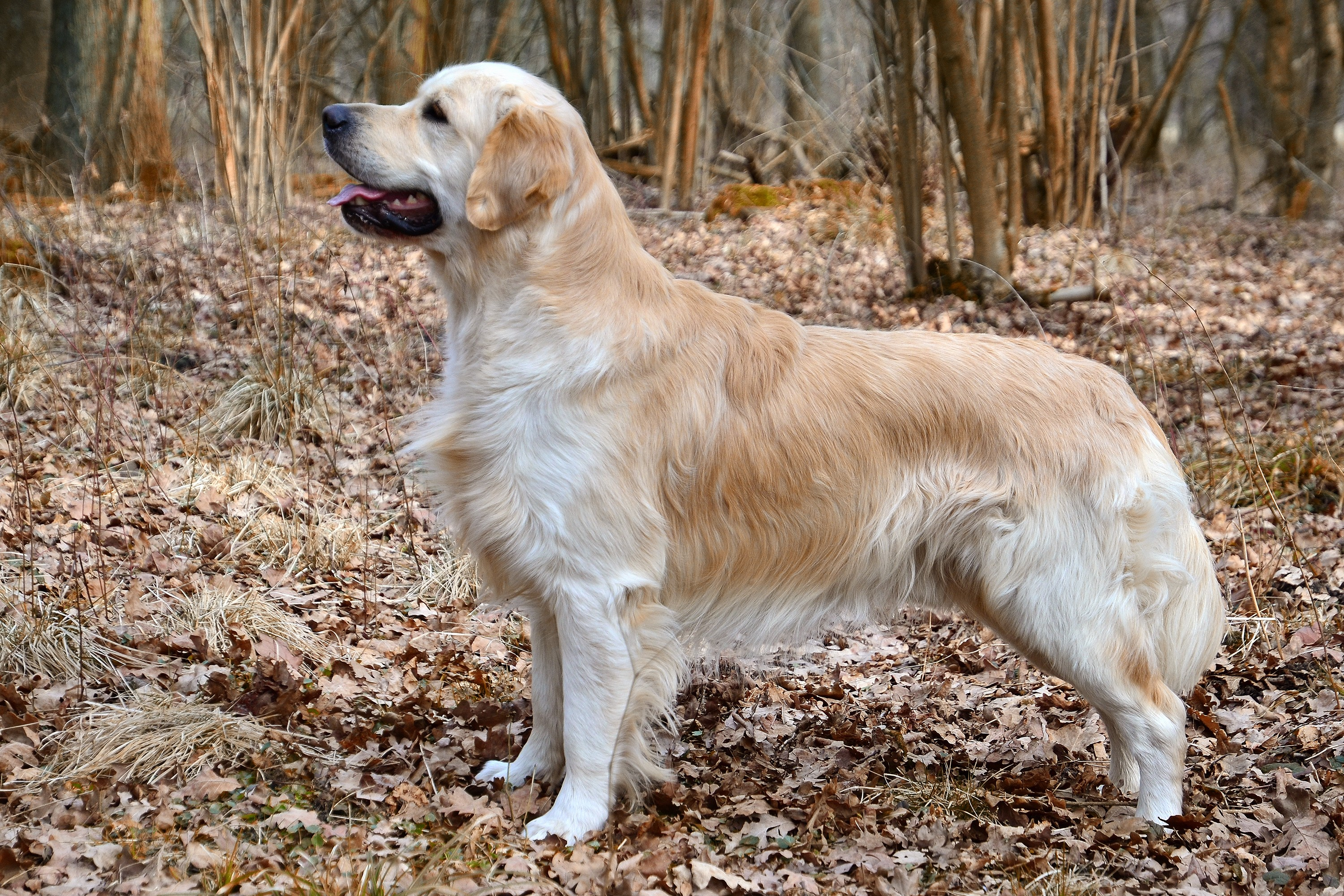 Golden Retriever Stehfoto/seitlich, im Laub